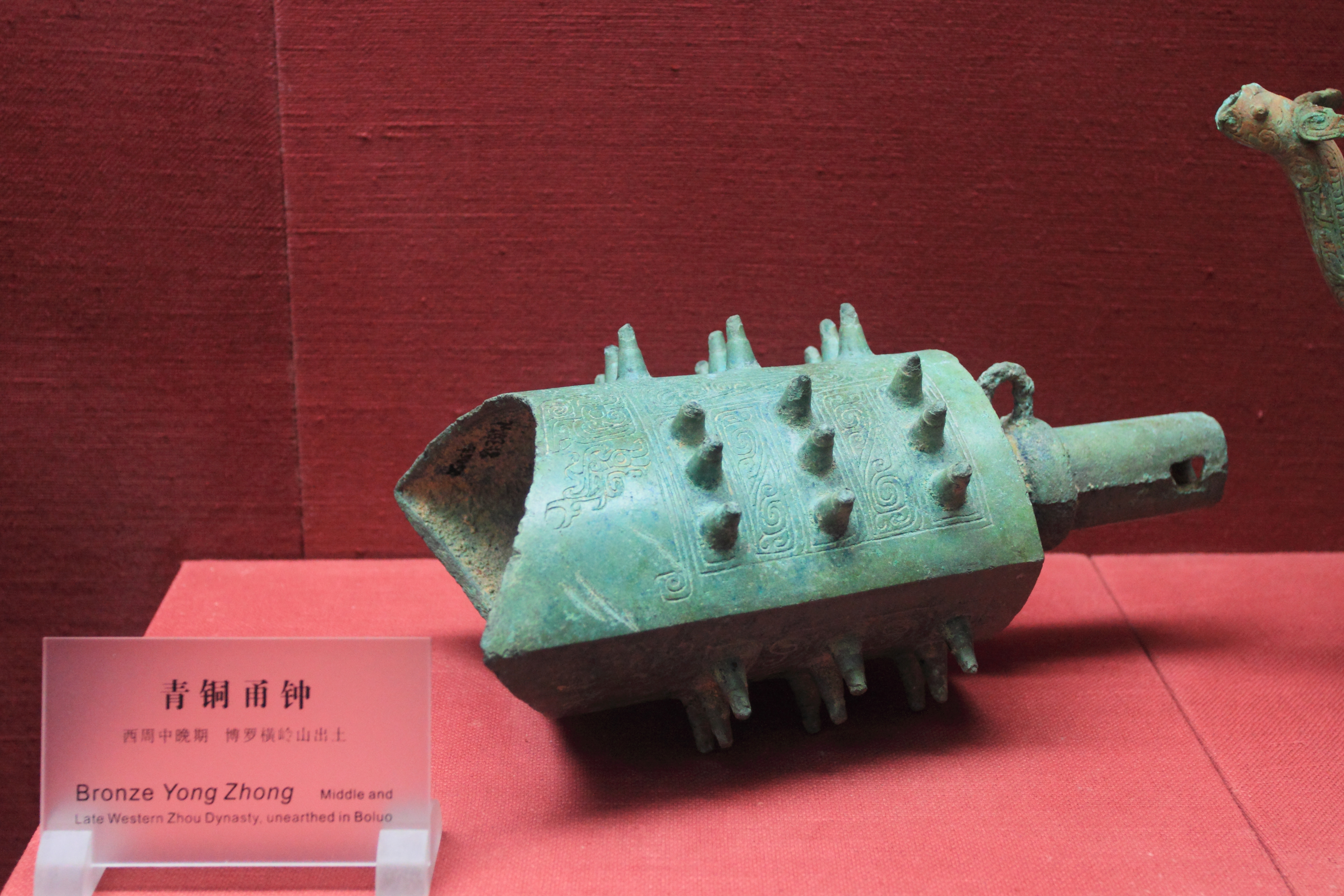 广东省博物馆 —— 广东历史文化陈列 —— 青铜甬钟，西周中晚期，博罗横岭山出土